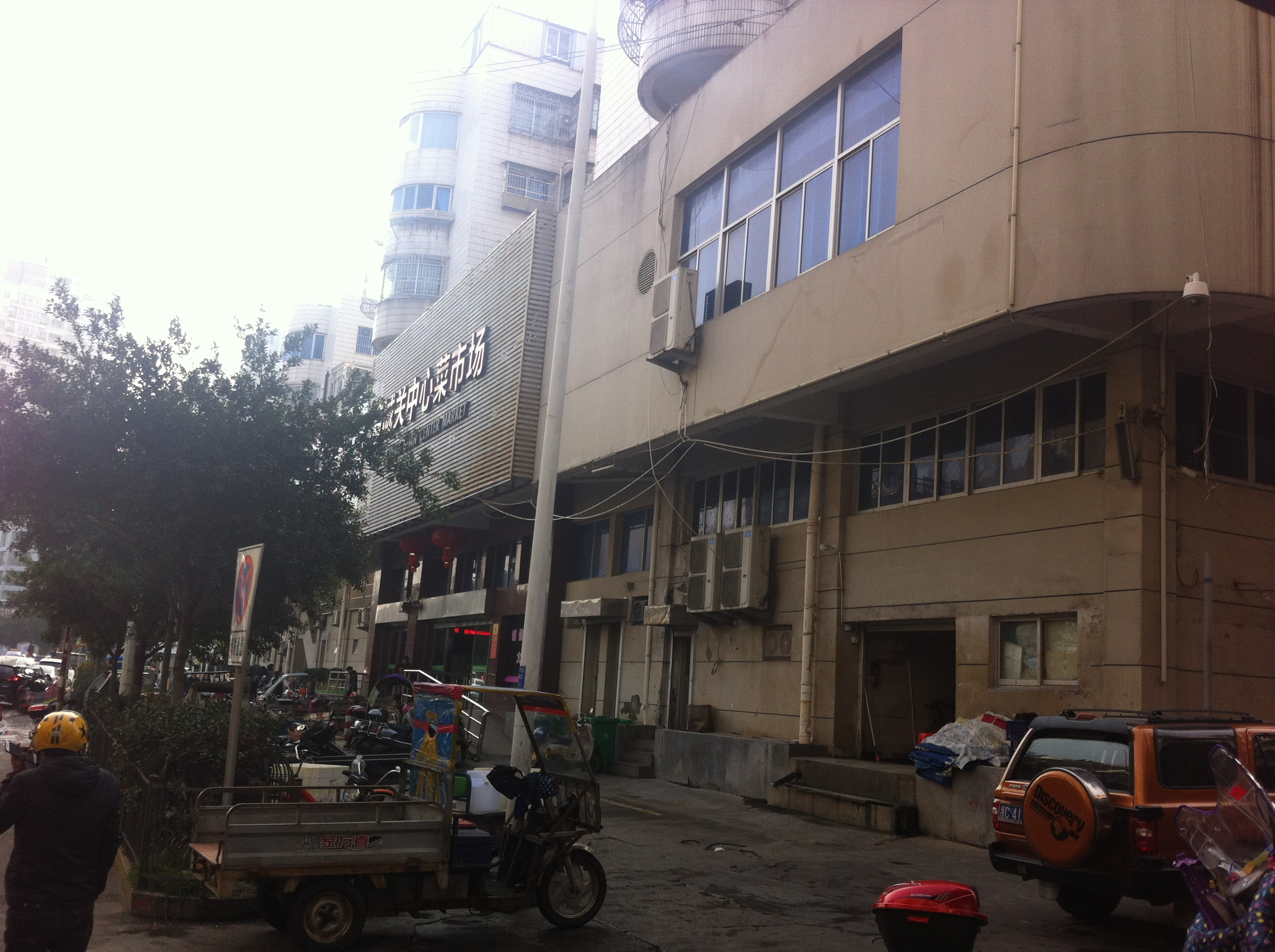 中文（中国大陆）: 玉环城关中心菜市场